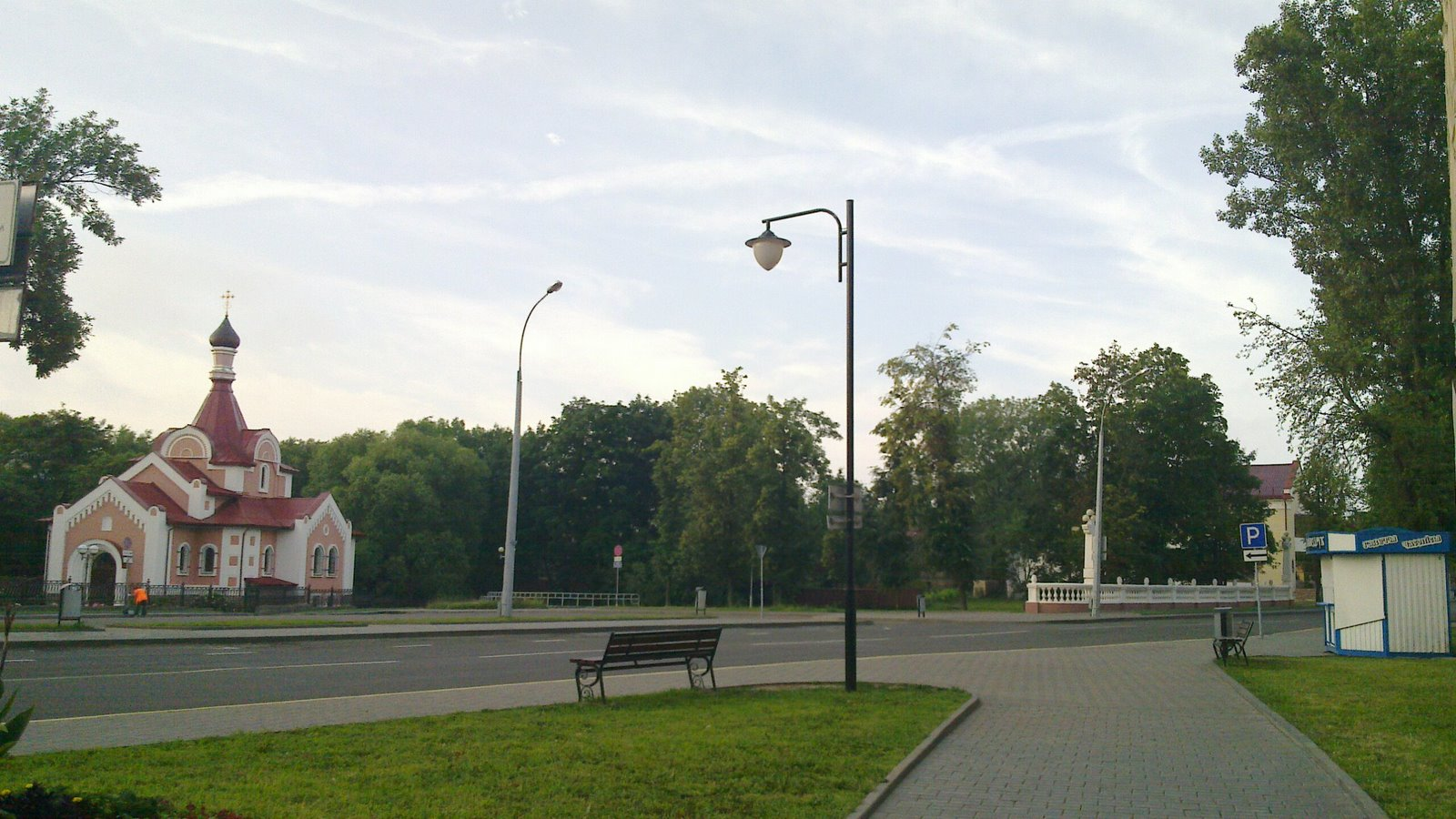 ул.Ленина